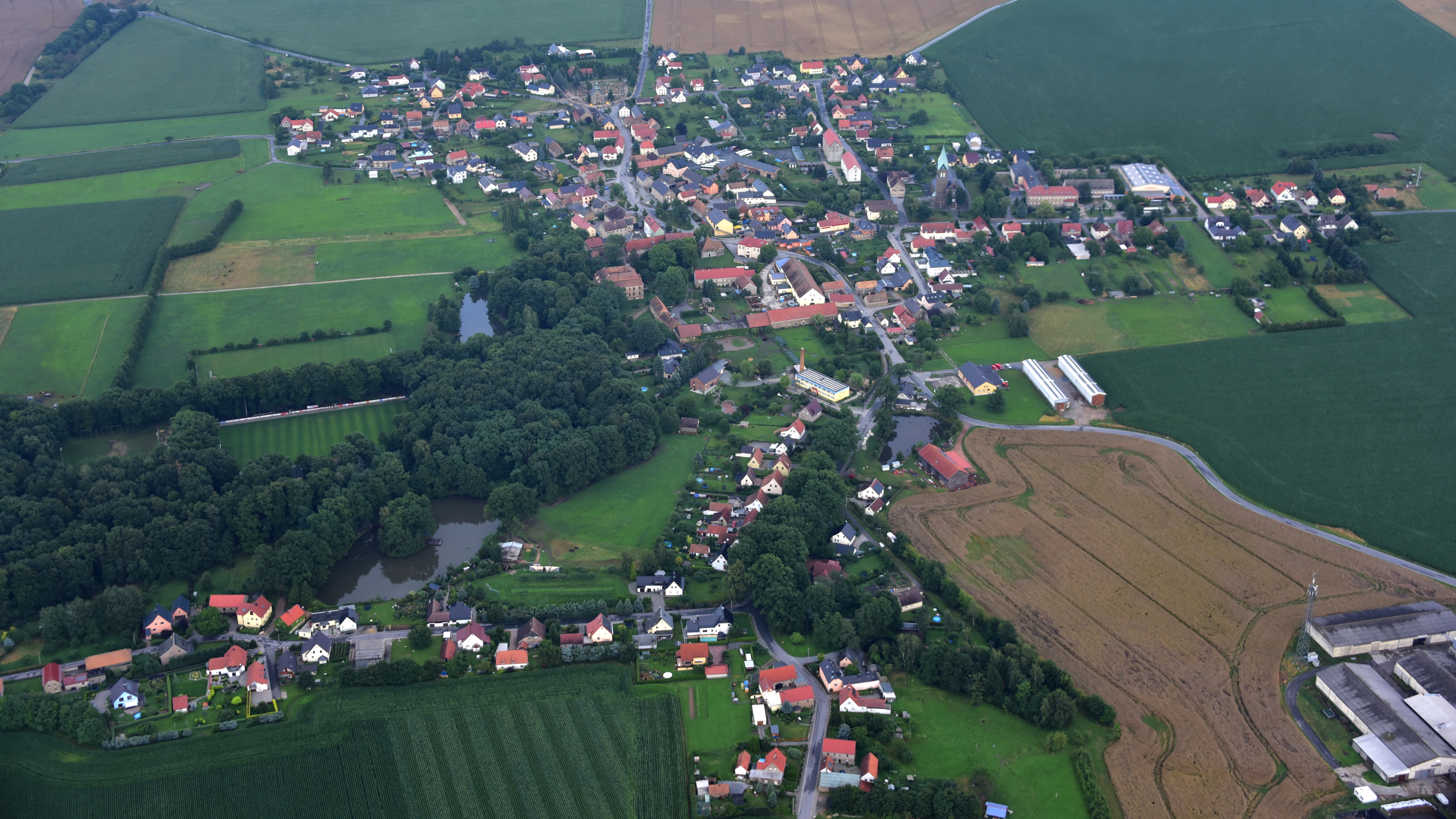 Radibor, Luftaufnahme (2017) Hornjoserbsce: Powětrowy wobraz Radworja (2017)